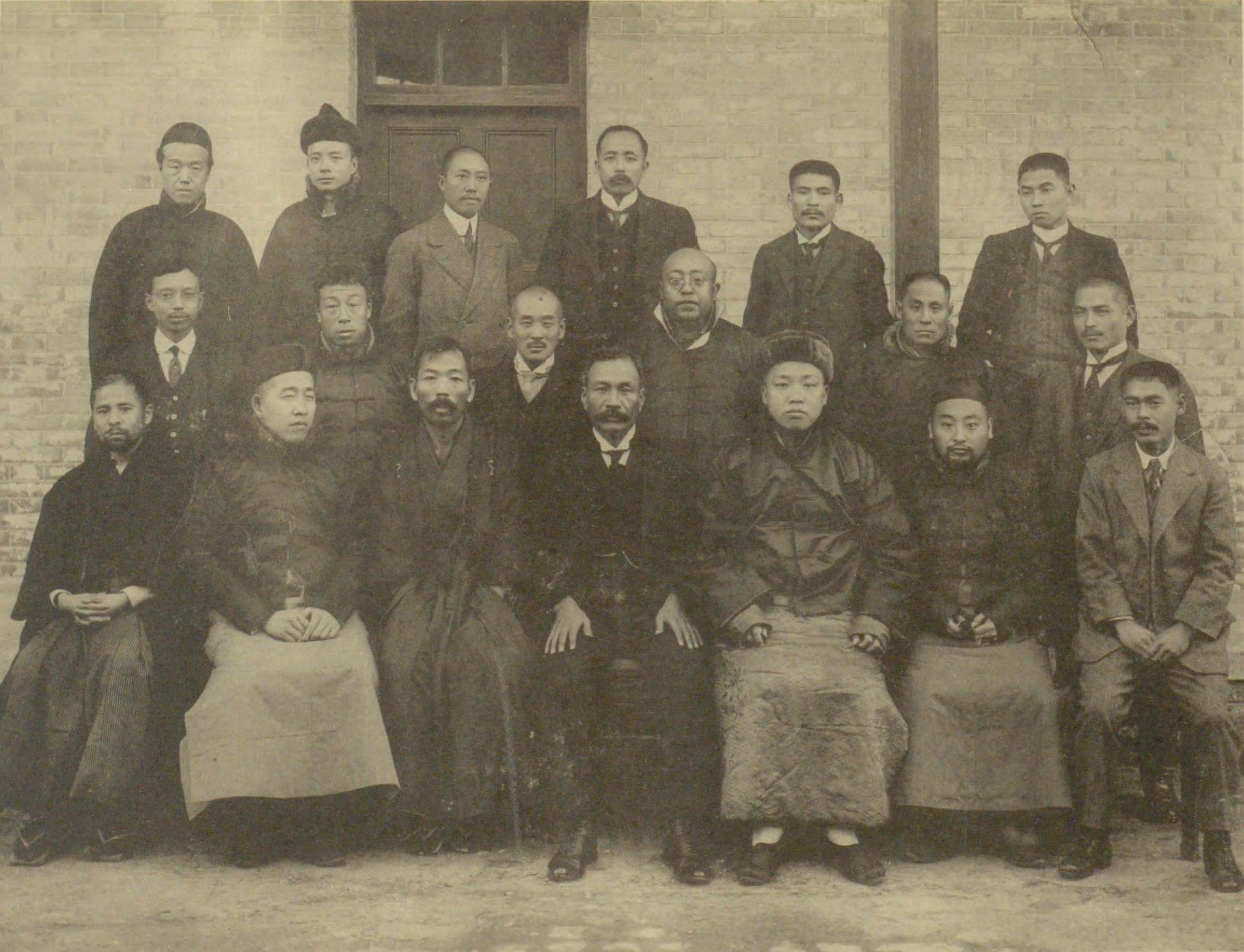 亀井陸良 順天時報社長時代と同人